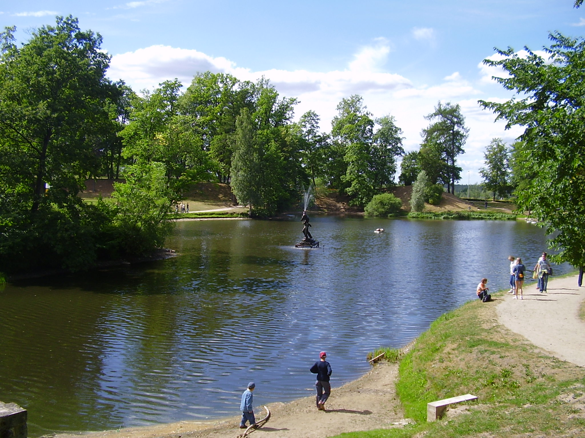 Le parc du vieux chateau à Cesis (Lettonie).